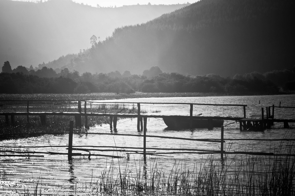 Lago Lanalhue atardecer bruma